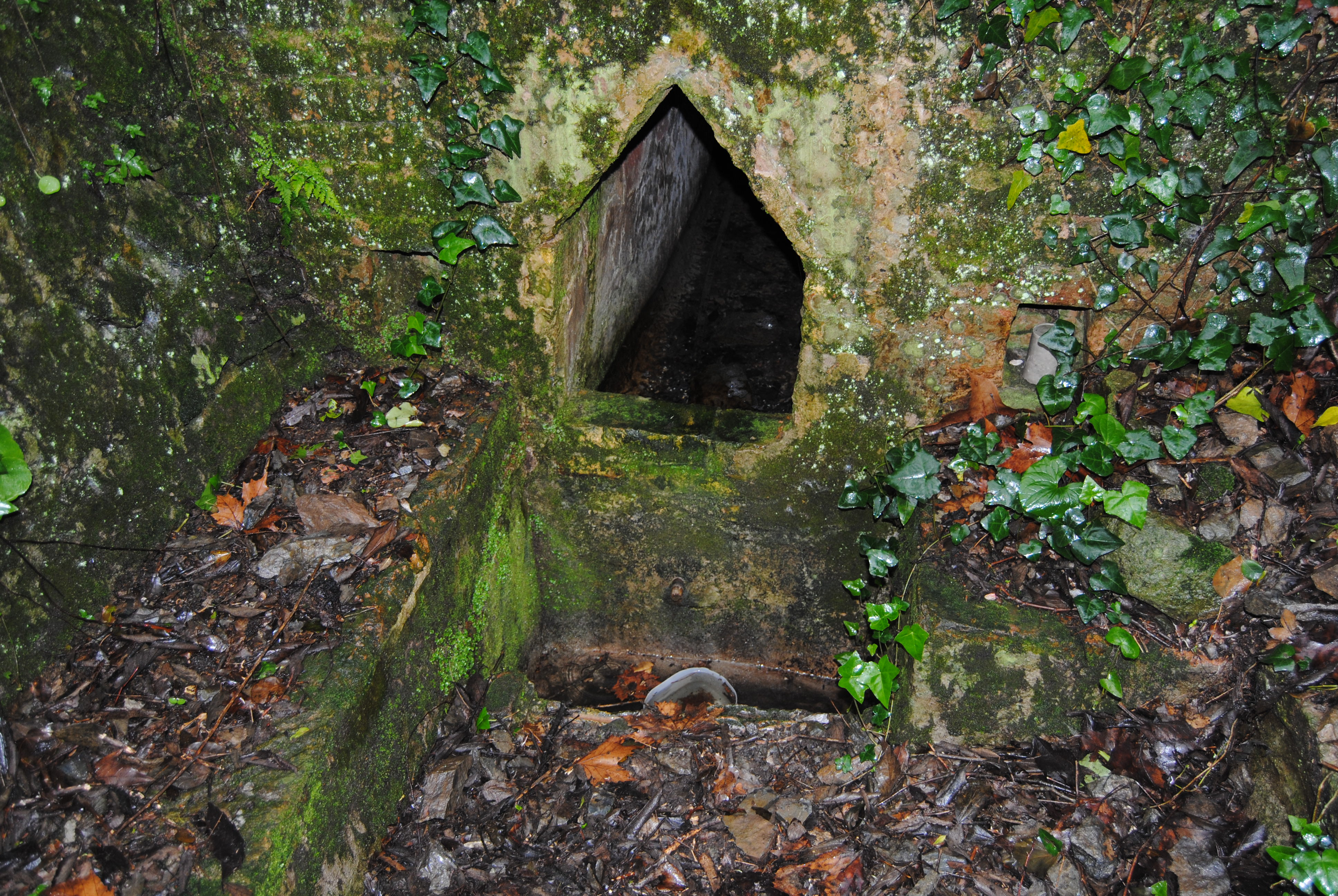 Font d'aigua ferruginosa del Mas d'en Mestre situada a Cortiella (Alforja)